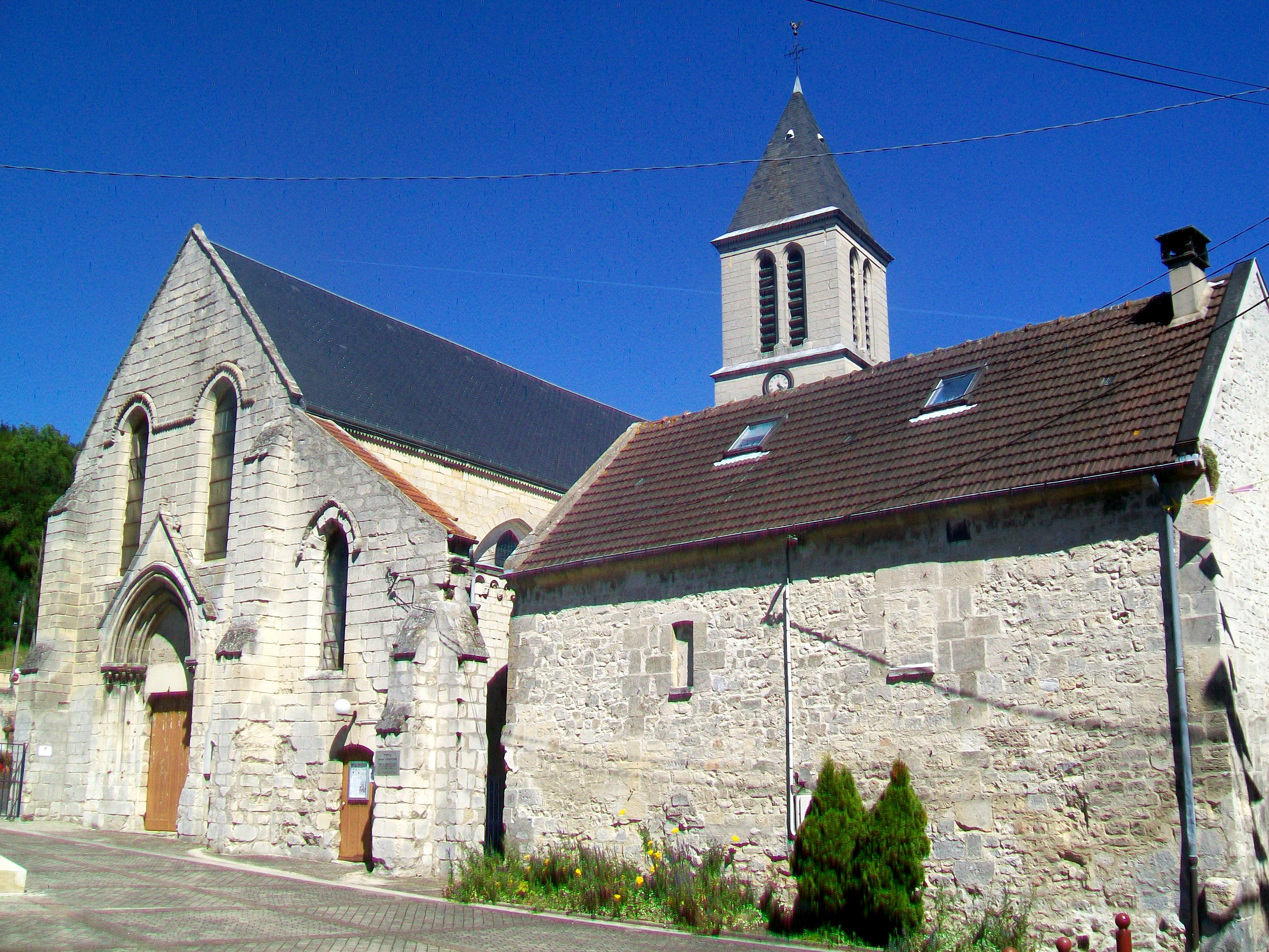 La façade occidentale et le portail ; le bâtiment à droite ne faisant pas partie de l'église.